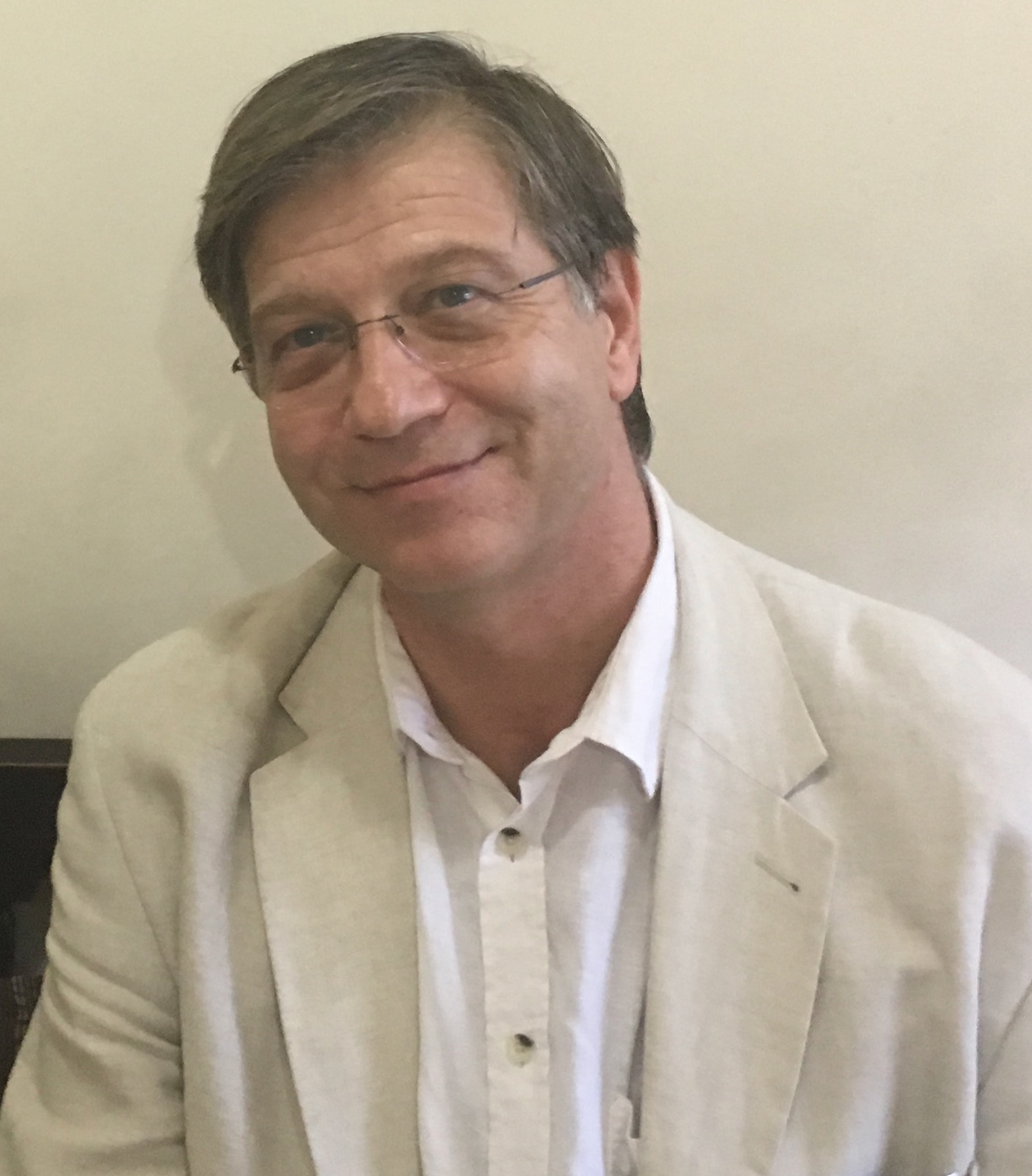 Olivier Da Lage